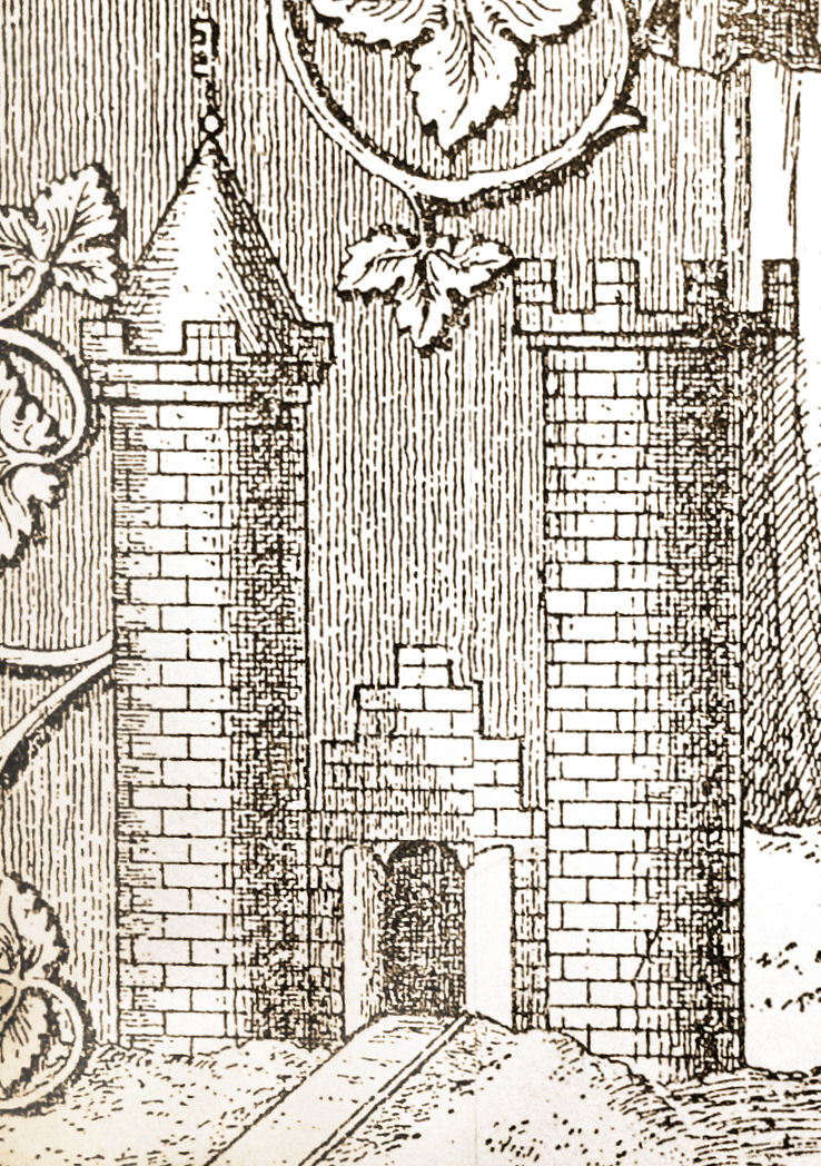 Burg Schladen 1363; stilisierte Darstellung auf der Grabplatte des Hildesheimer Bischofs Heinrich III.